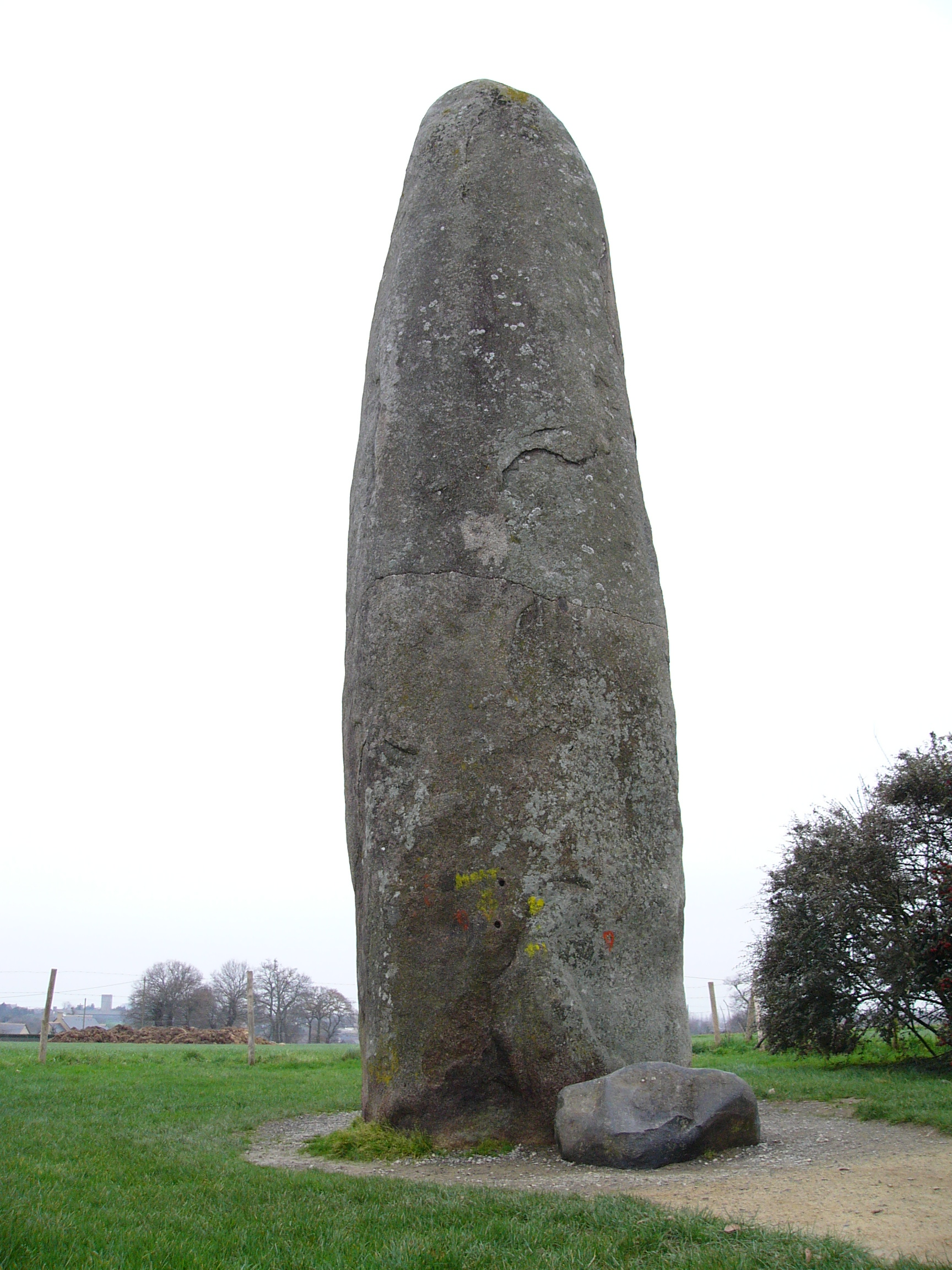 Menhir du Champ-Dolent ( Dol-de-Bretagne )